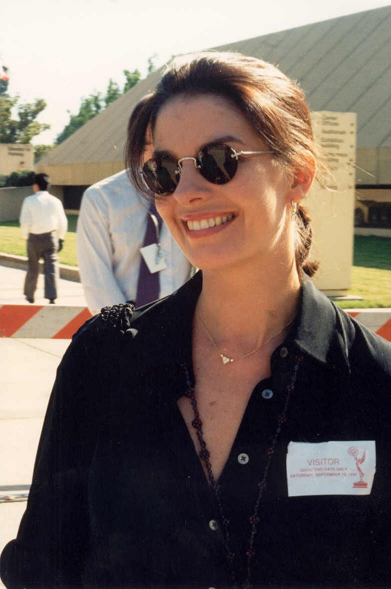 Sela Ward meets fans outside the Emmy rehearsal 9/10/94.